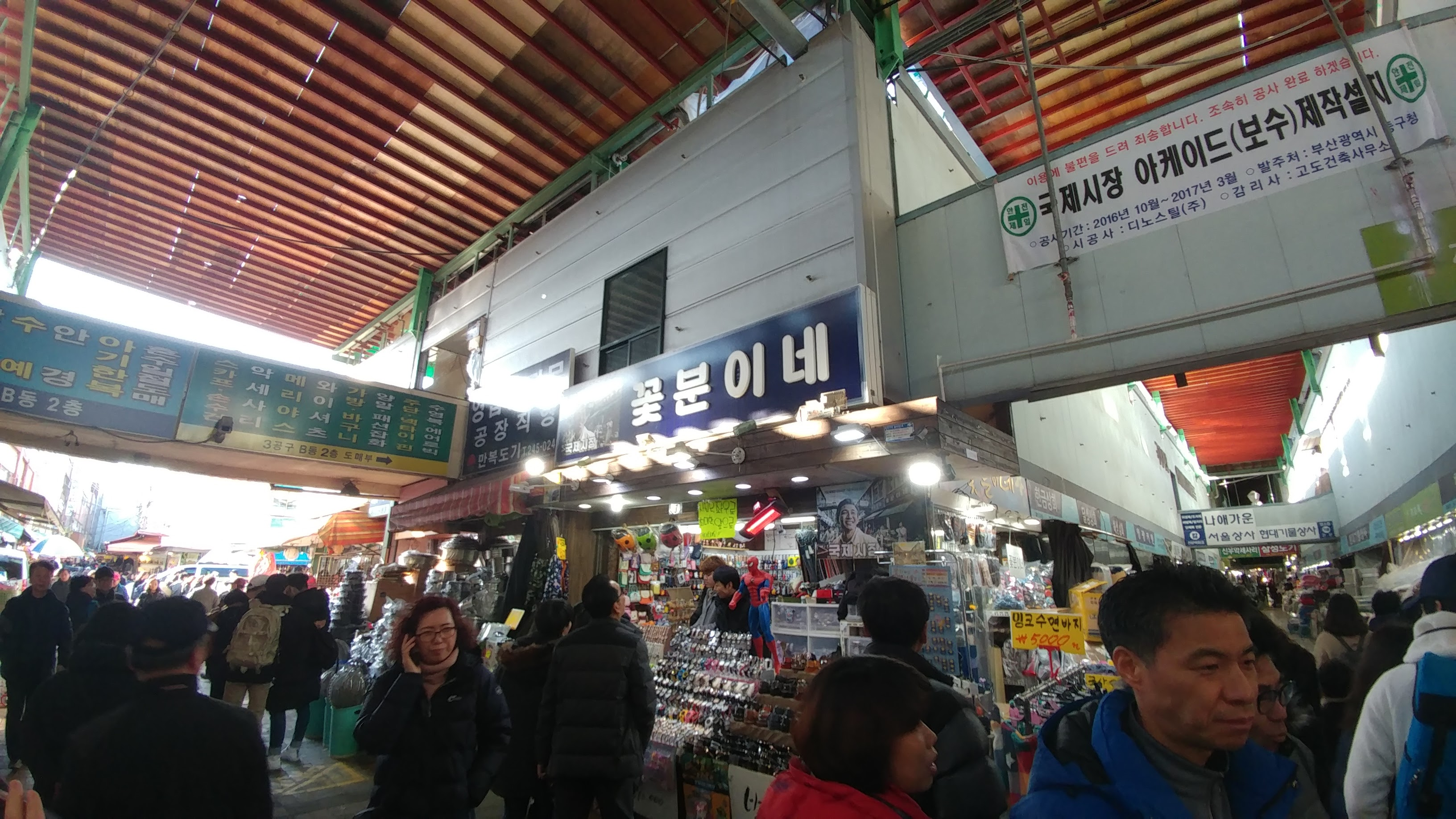 부산 국제시장 꽃분이네